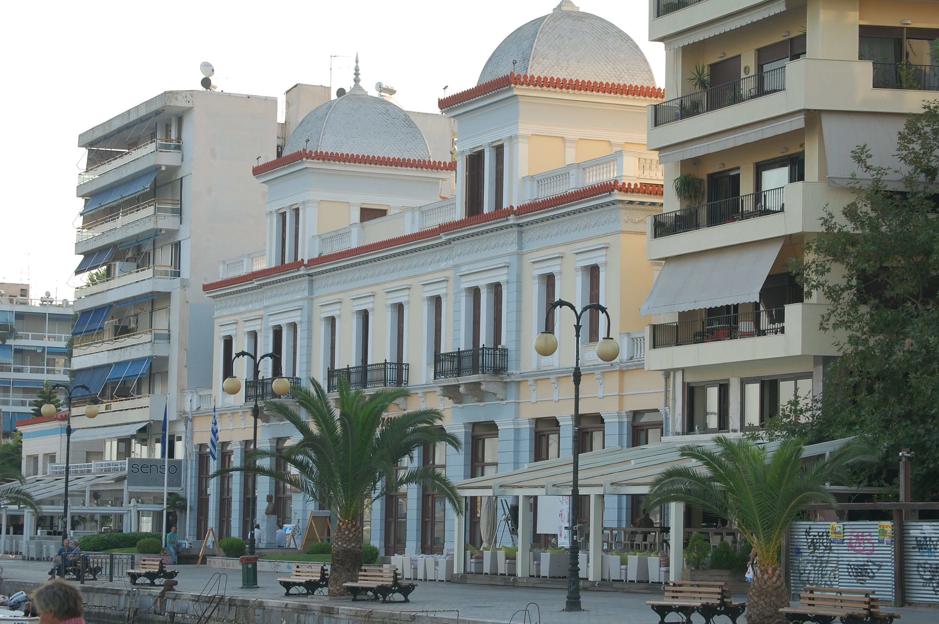 νέα Αρτάκη Χαλκίδα Εύβοια